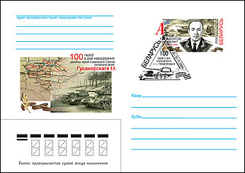 Художественный конверт почты Беларуси с оригинальной маркой, посвященный 100-летию со дня рождения И. И. Гусаковского.